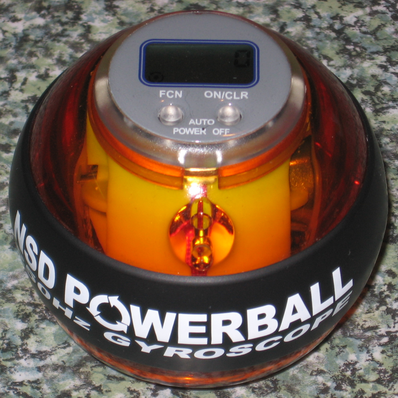 powerball